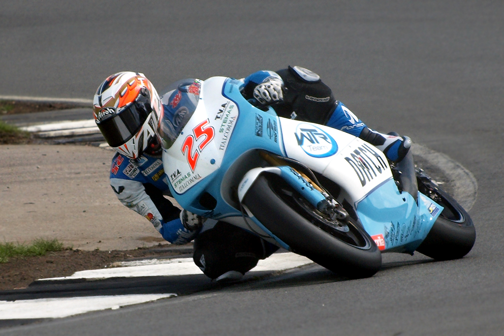 MotoGP 250cc Alex Baldolini, WTR San Marino Team